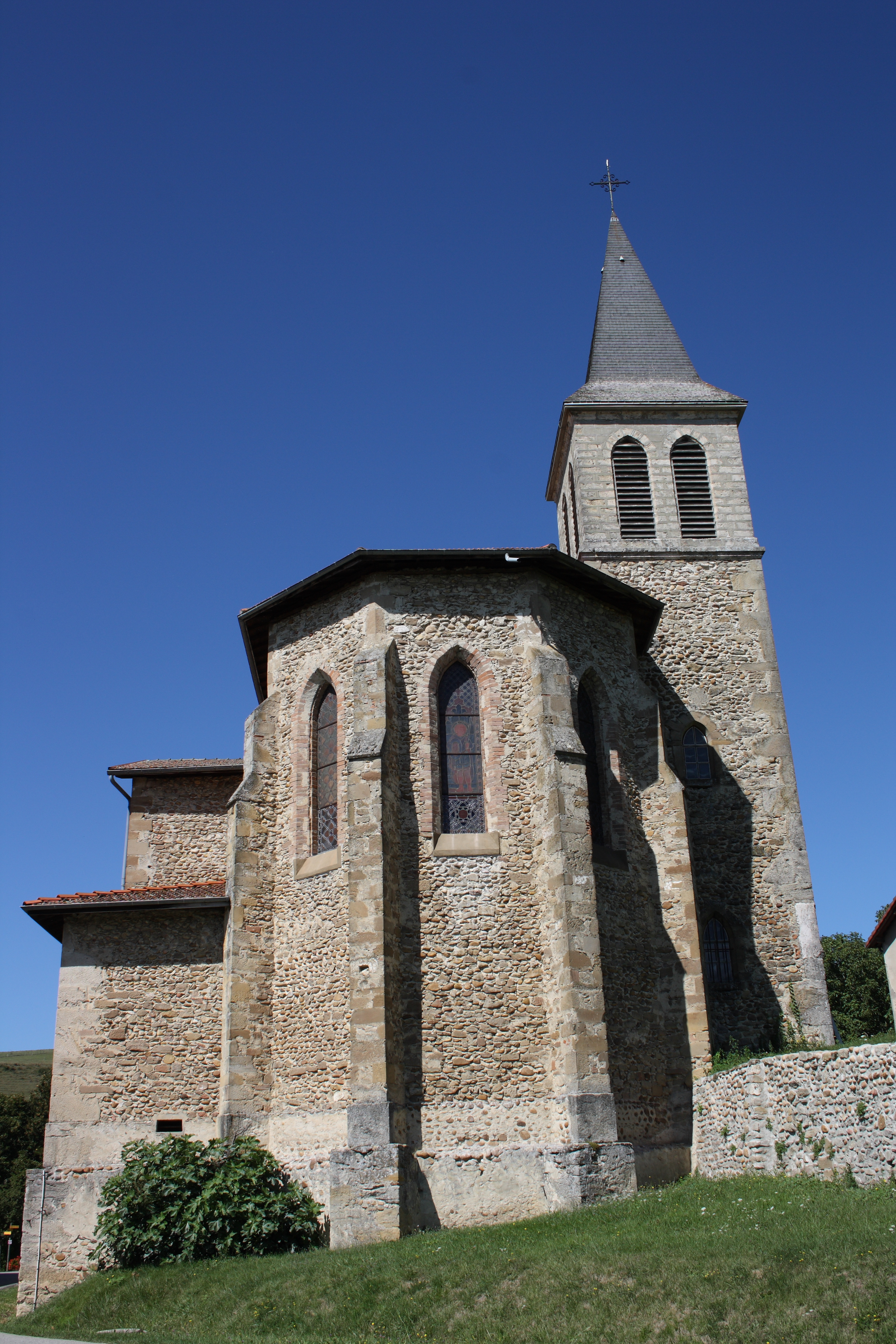 katholischen Kirche in Dionay